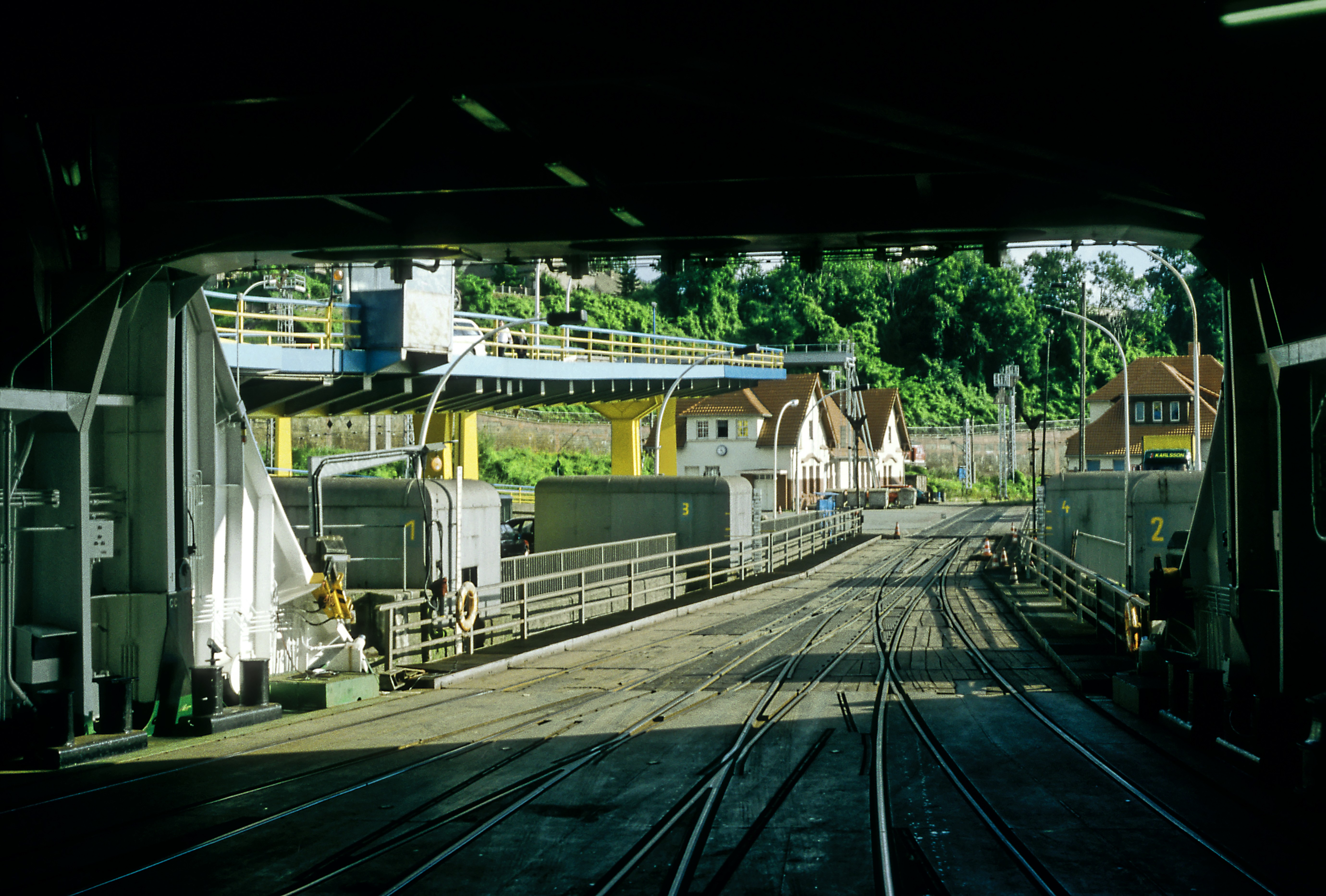 Blick vom Hauptdeck auf die Fährbrücke des Fährbettes 1 mit Vierfachweiche im alten Bahnhof Sassnitz Hafen